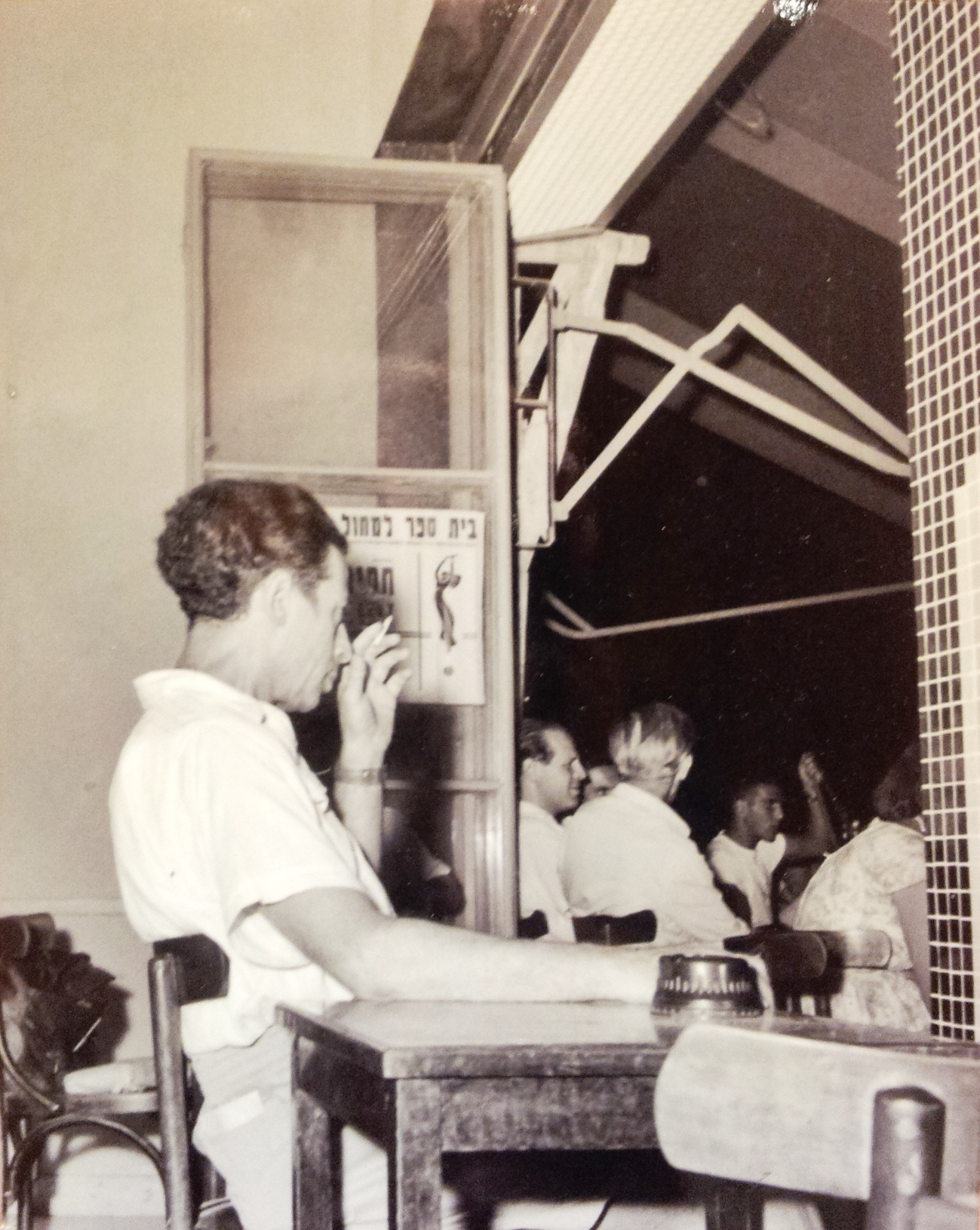 המשורר אבות ישורון בבית קפה בתל אביב בסוף שנות החמישים, צילום: מקסים סלומון, אוסף פרטי : איריס מילנר לבית סלומון. מוצג במבואה של מגדל שלום בתל אביב. צולם ביוני 2012